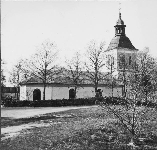 Kyrkan mot norr.